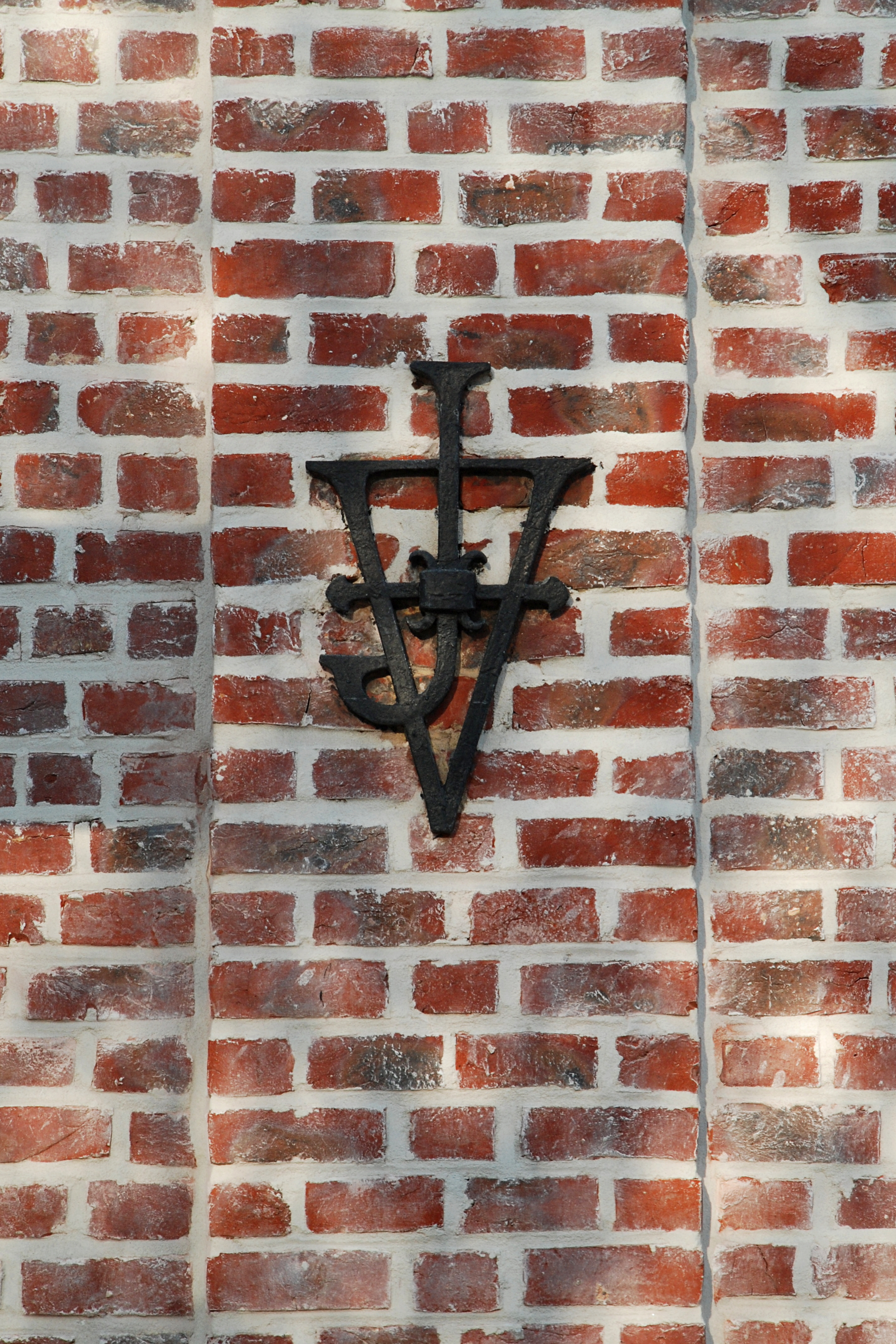 Belgique - Watermael - Entrepôt Van Cutsem (néo-gothique, architecte Albert Roosenboom, 1902)